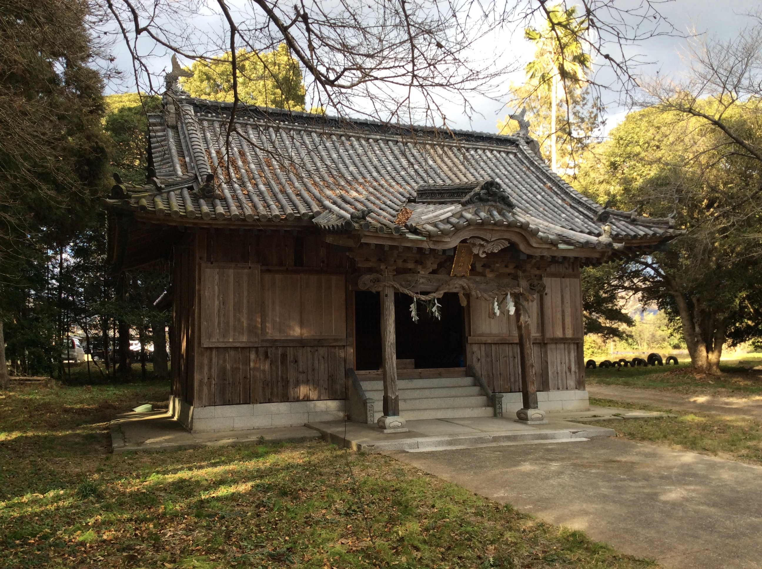 建布都神社（市場町香美）